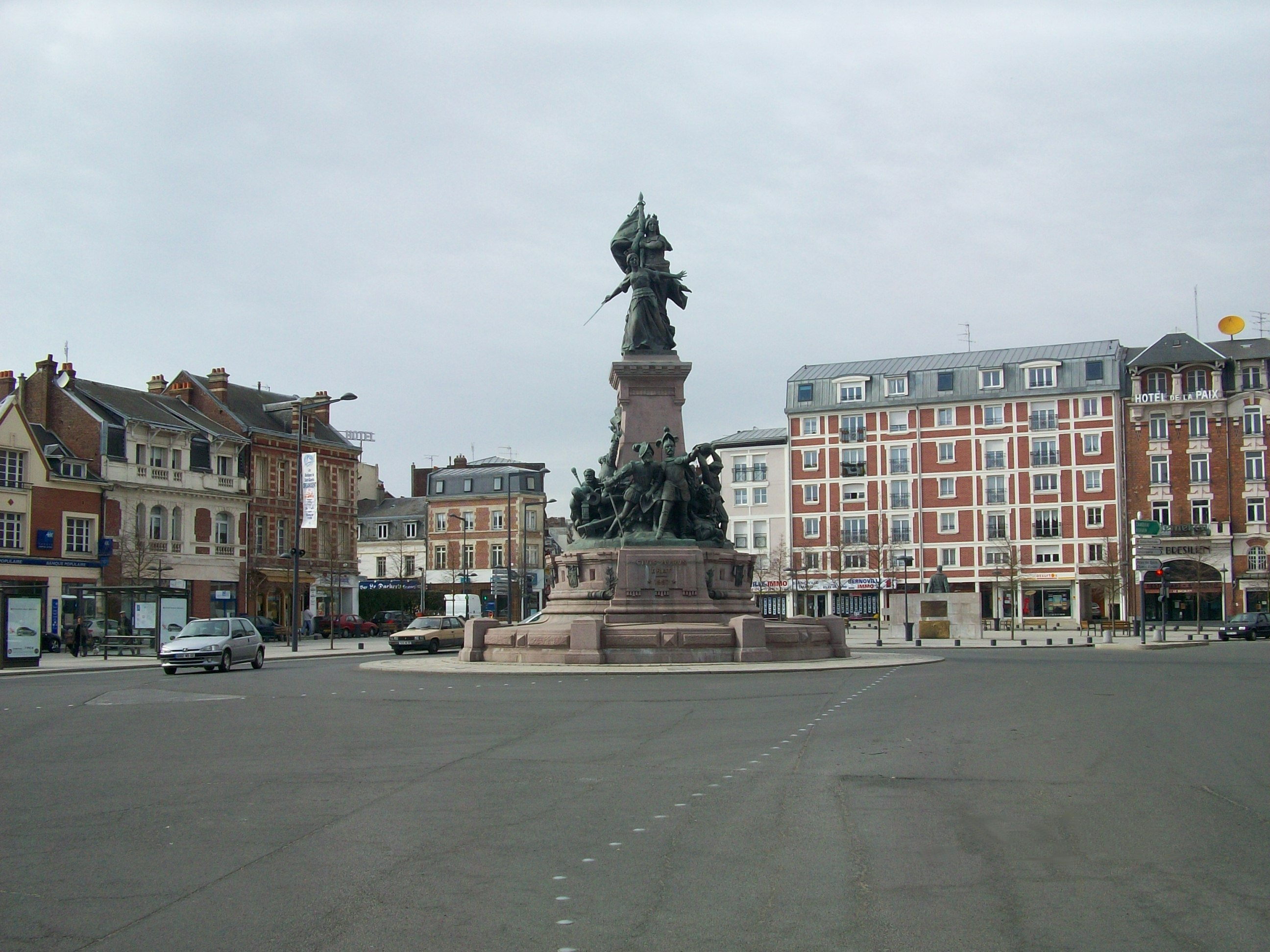 Photo prise Place du 8 Octobre 1870 à Saint-Quentin Aisne.